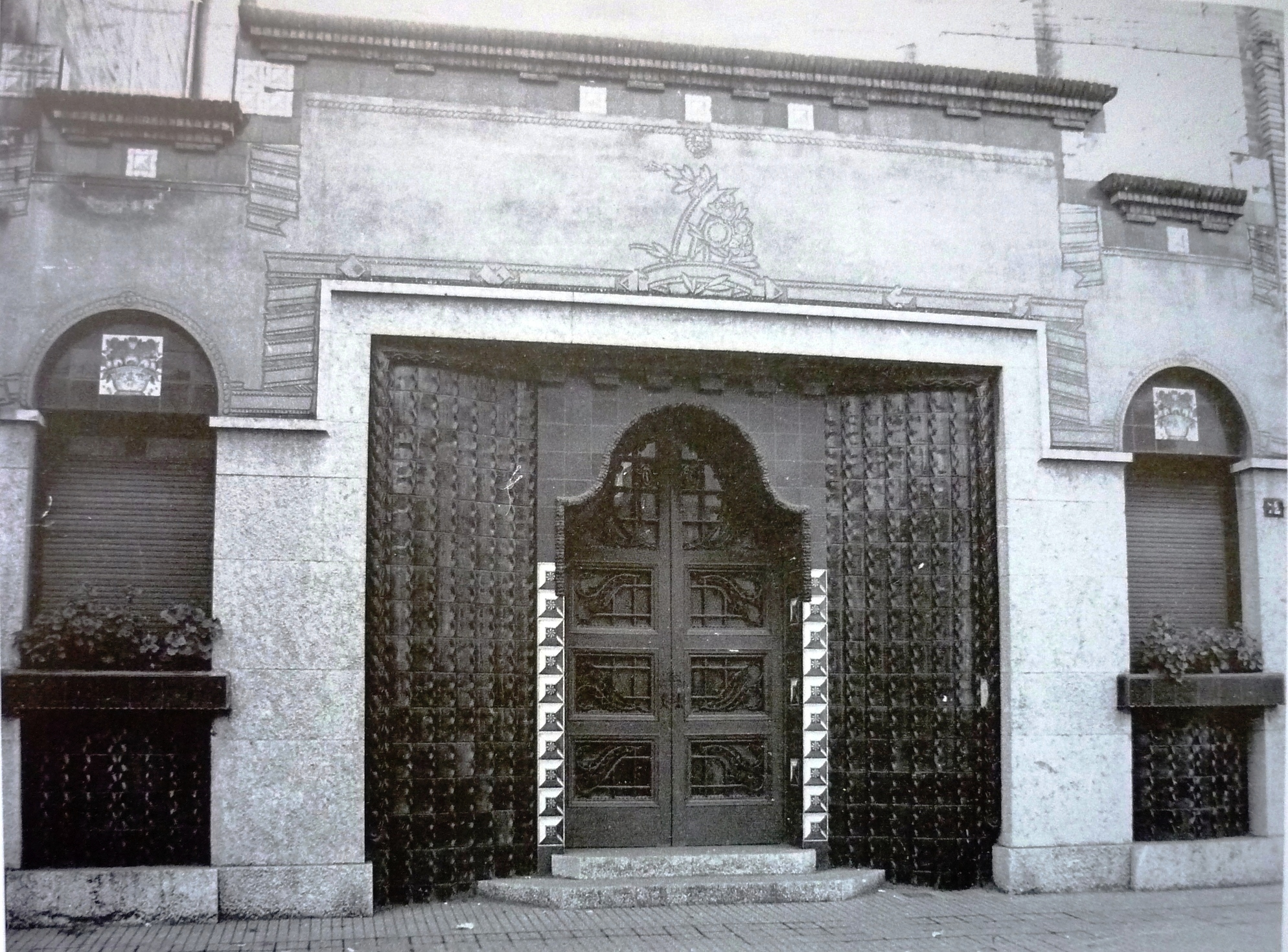 Casa unifamiliar